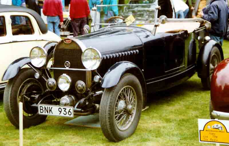 Bugatti Type 49 Tourer 1929